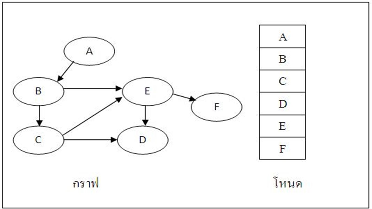 กราฟแบบไดกราฟ (Direct Graph)